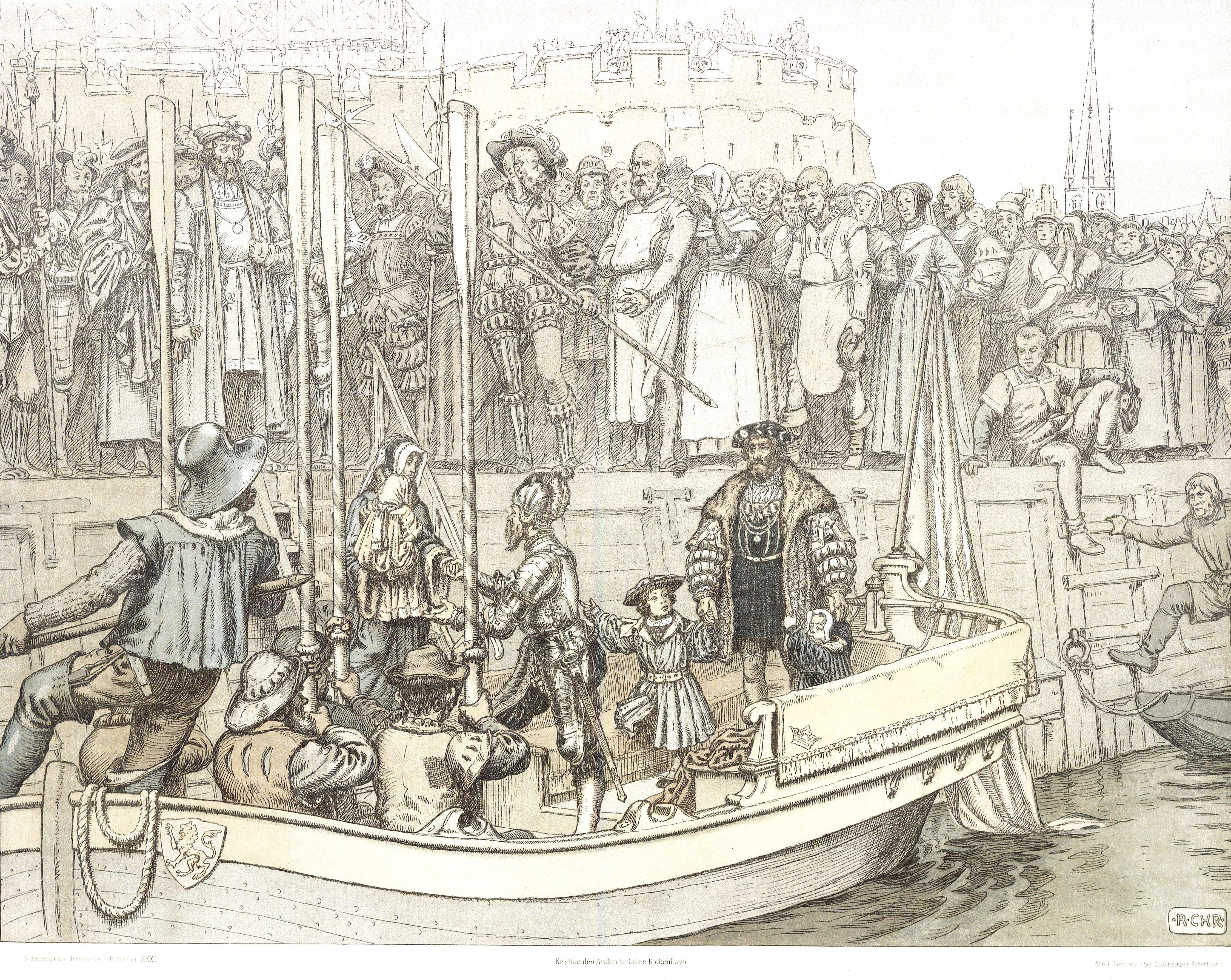 Christian 2 - Danmarks sidste katolske konge - forlod København i 1523, sammen med dronning Elisabeth samt børnene, Hans, Dorothea og Christine. (Rasmus Christiansen, 1863 - 1940)